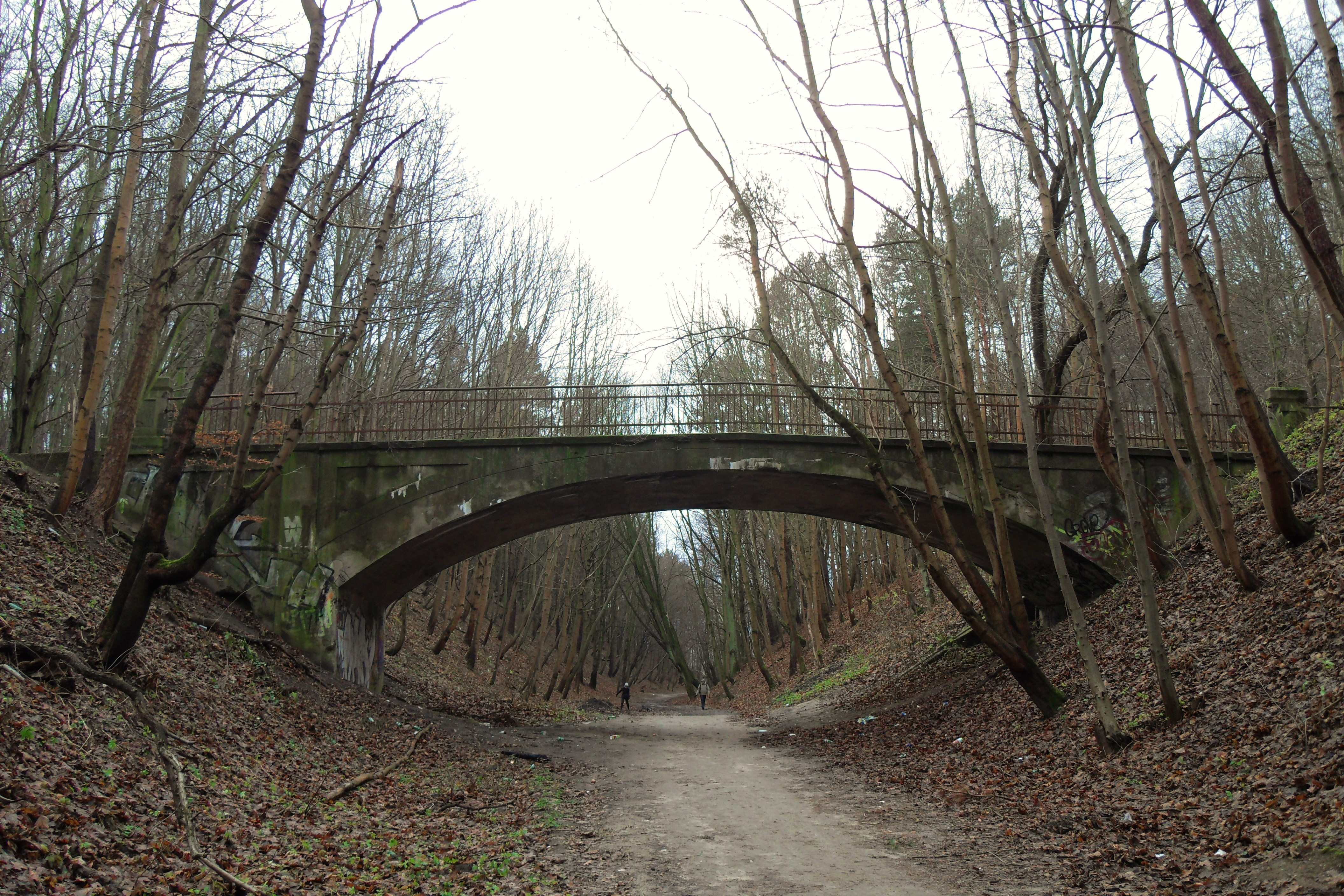 Gdańsk Strzyża, nieistniejący ok. 100-letni wiadukt nad dawną linią kolejową (strona północna).